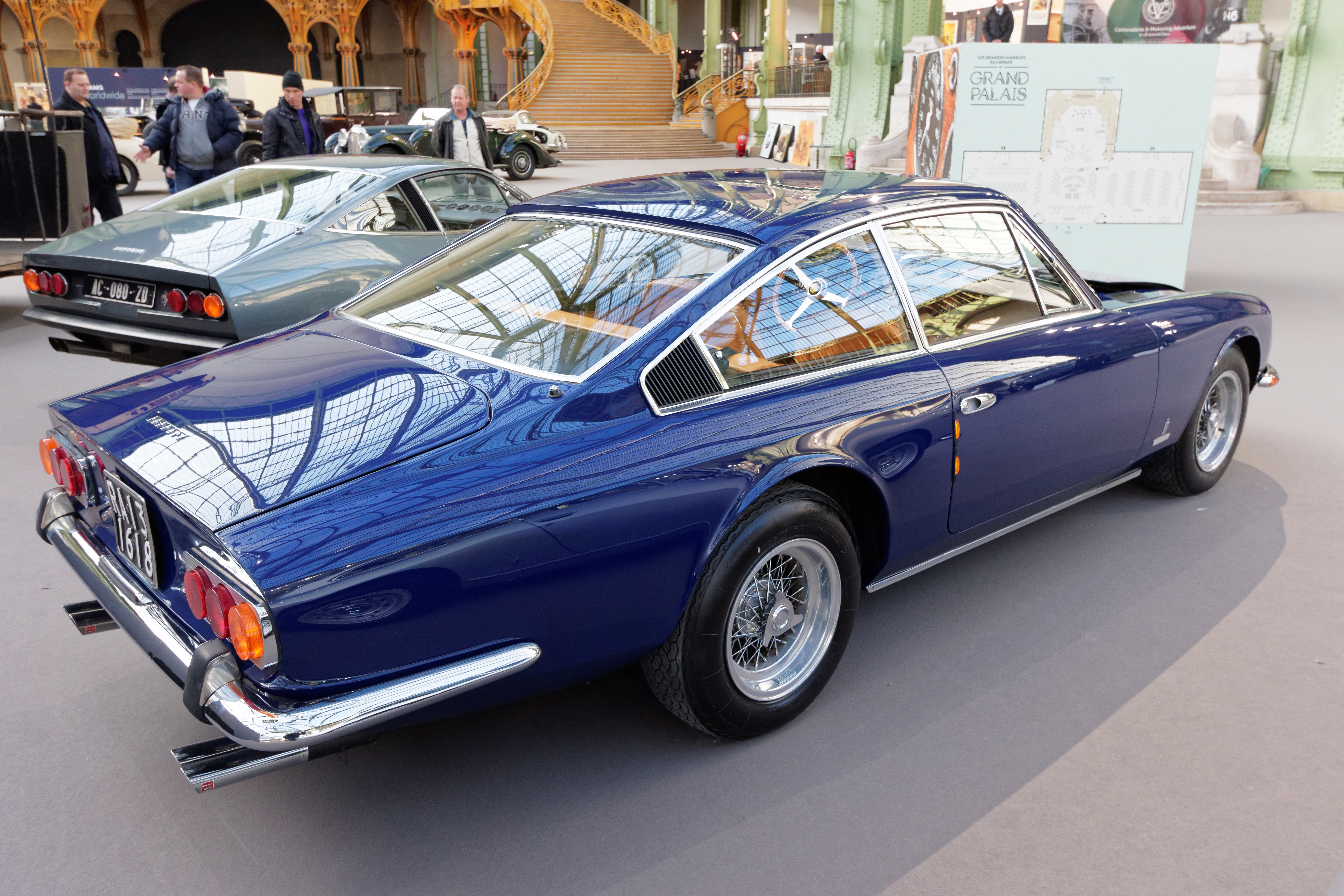 Un des véhicules présenté lors de la vente aux enchères Bonhams 2015 au Grand Palais de Paris.